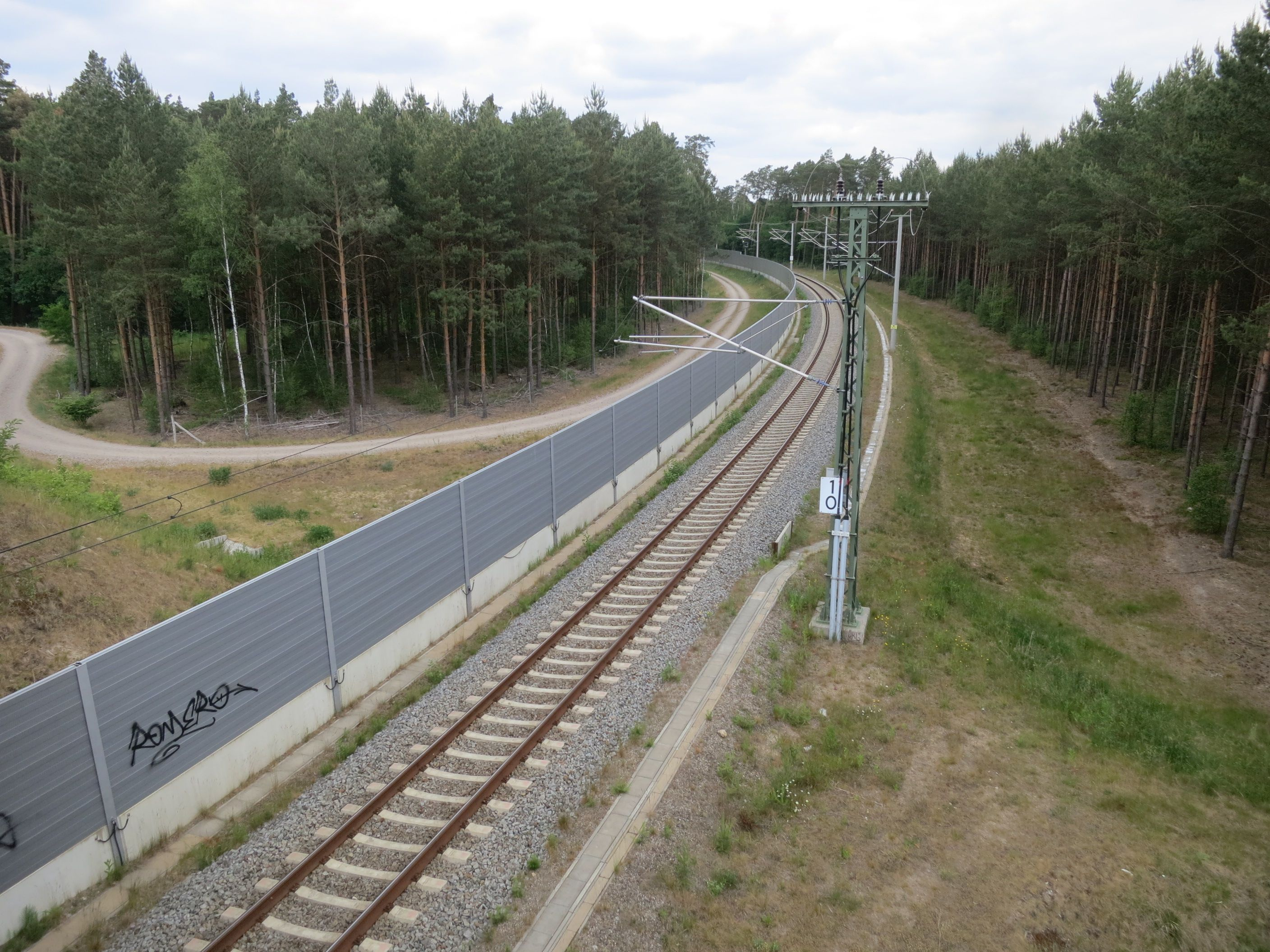 Fernbahnstrecke zum Flughafen BER, Verbindungskurve nach Berlin-Grünau im Wald bei Bohnsdorf mit Lärmschutzwand